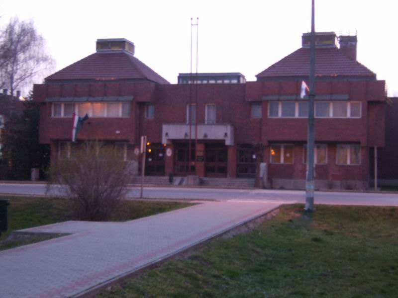 Fehérgyarmati Városi Bíróság. - Kossuth tér #36, Fehérgyarmat, Hungary